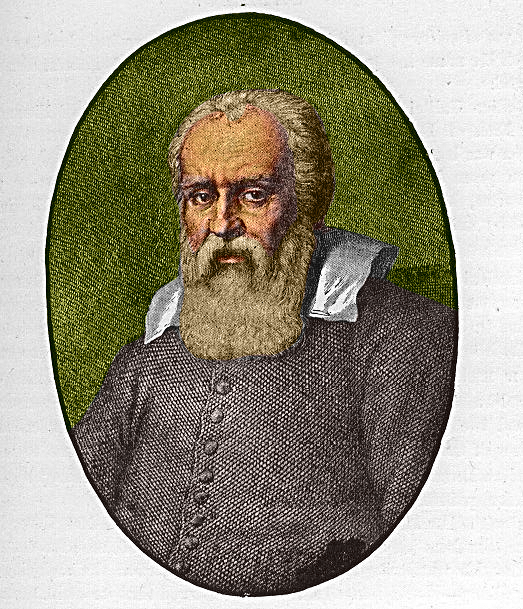 Galileo Galilei. Incisione acquarellata tratta dal ritratto fattogli dal Passignano.